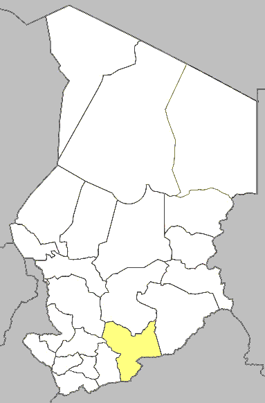 Mappa della diocesi di Sarh, in Ciad.